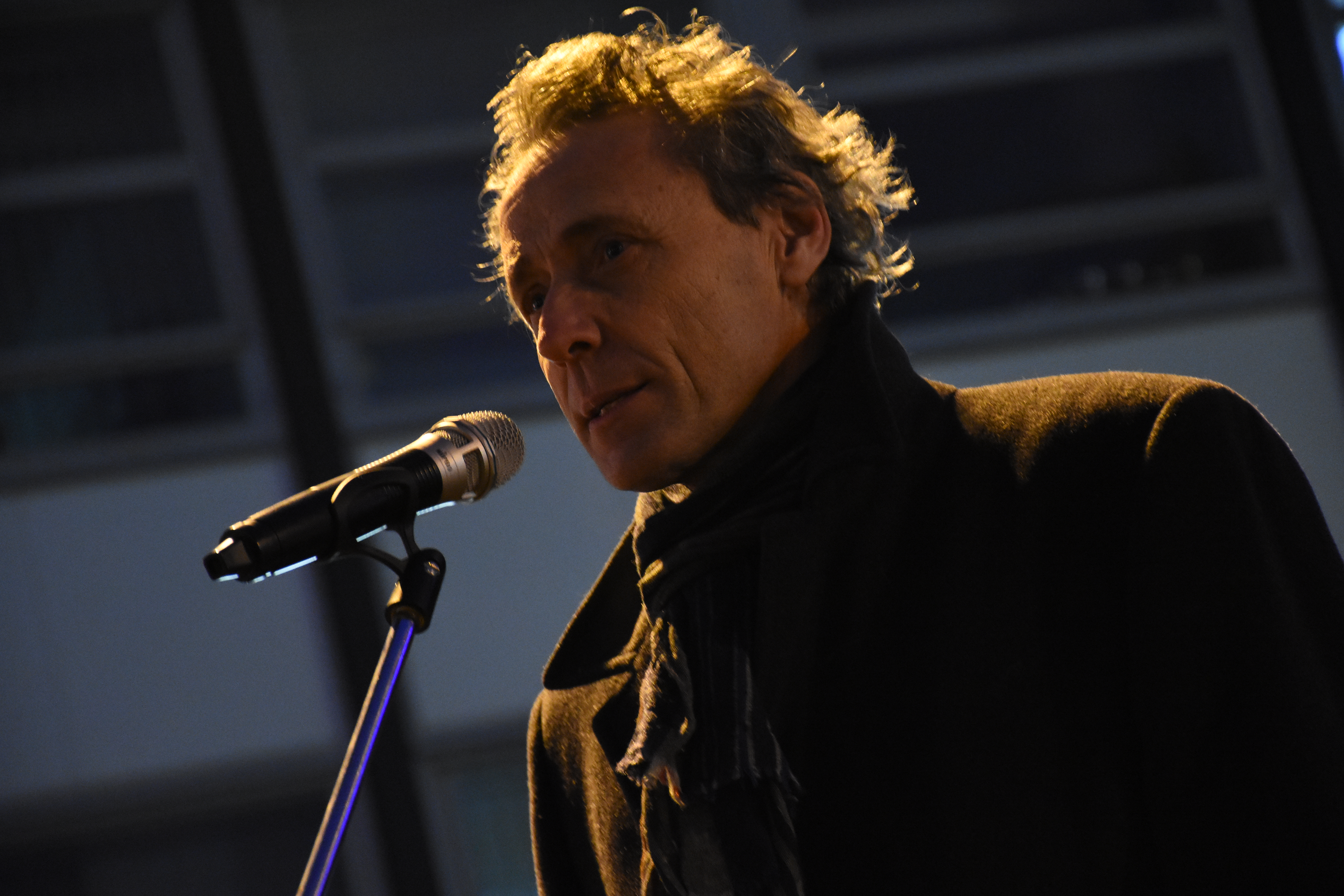 hovoří Ivo Medek